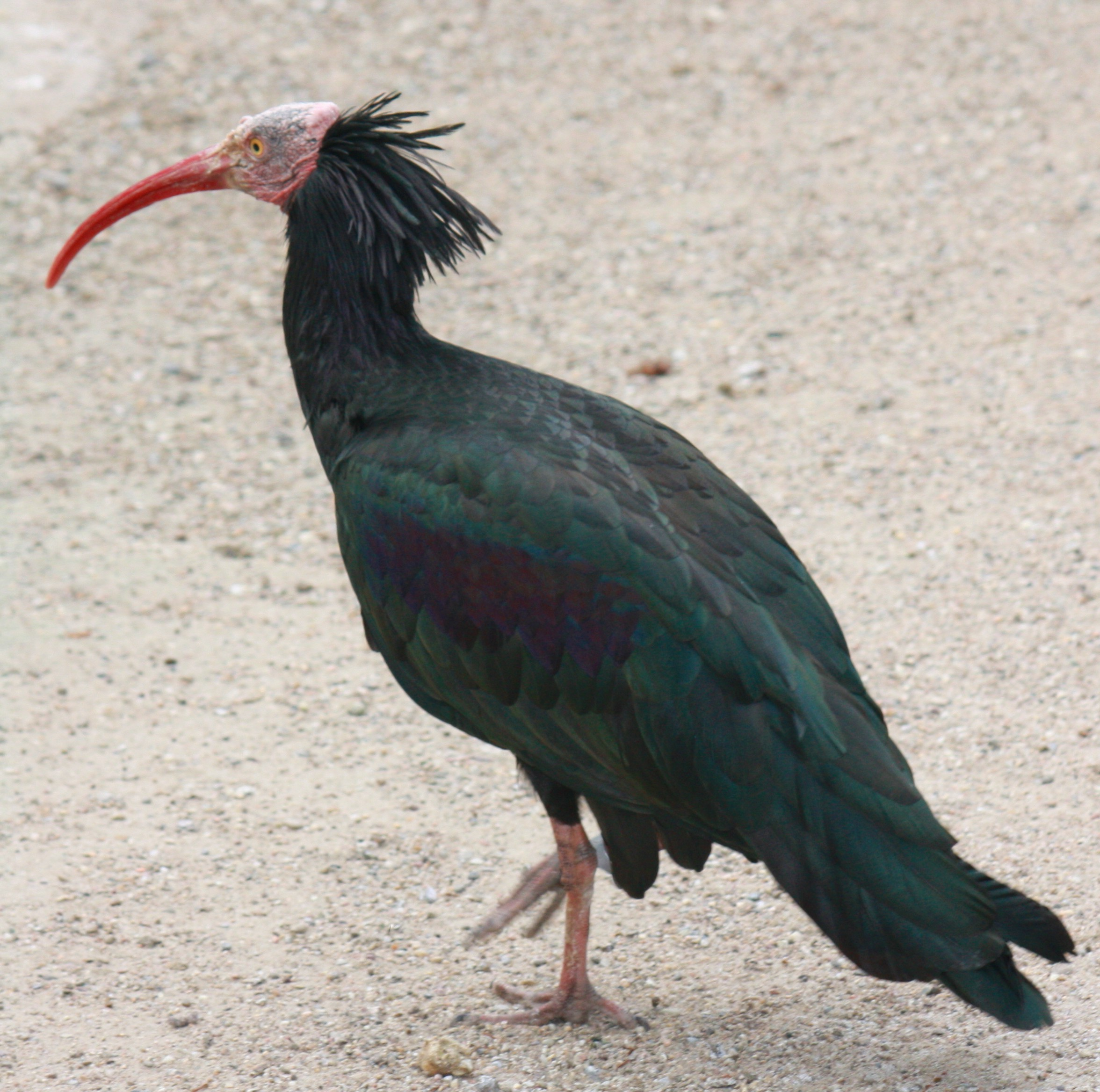 Waldrapp in der Orangerie in Straßburg